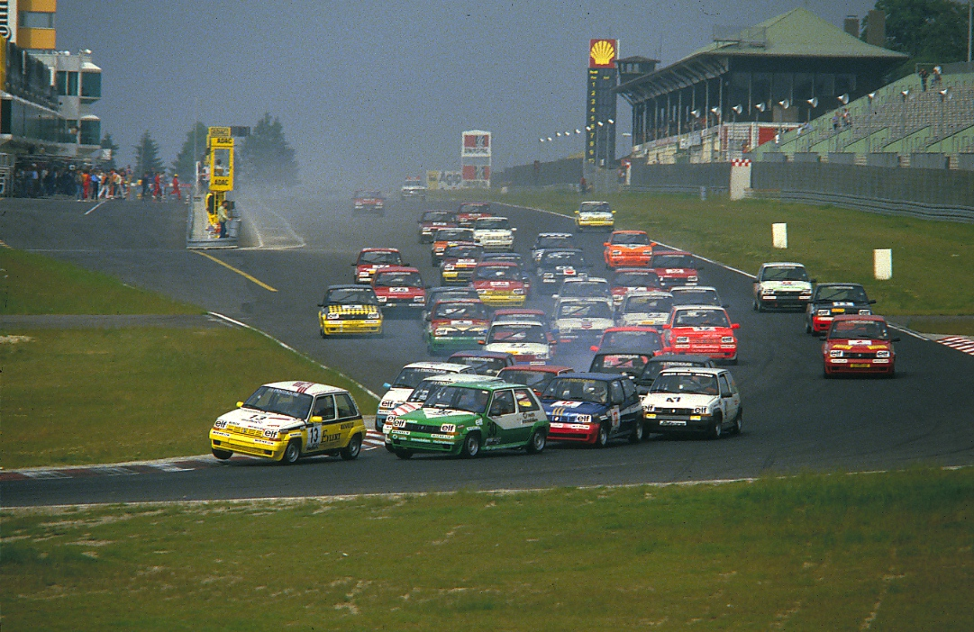 Renault-5-Pokal auf dem Nürburgring - Sekunden nach dem Start